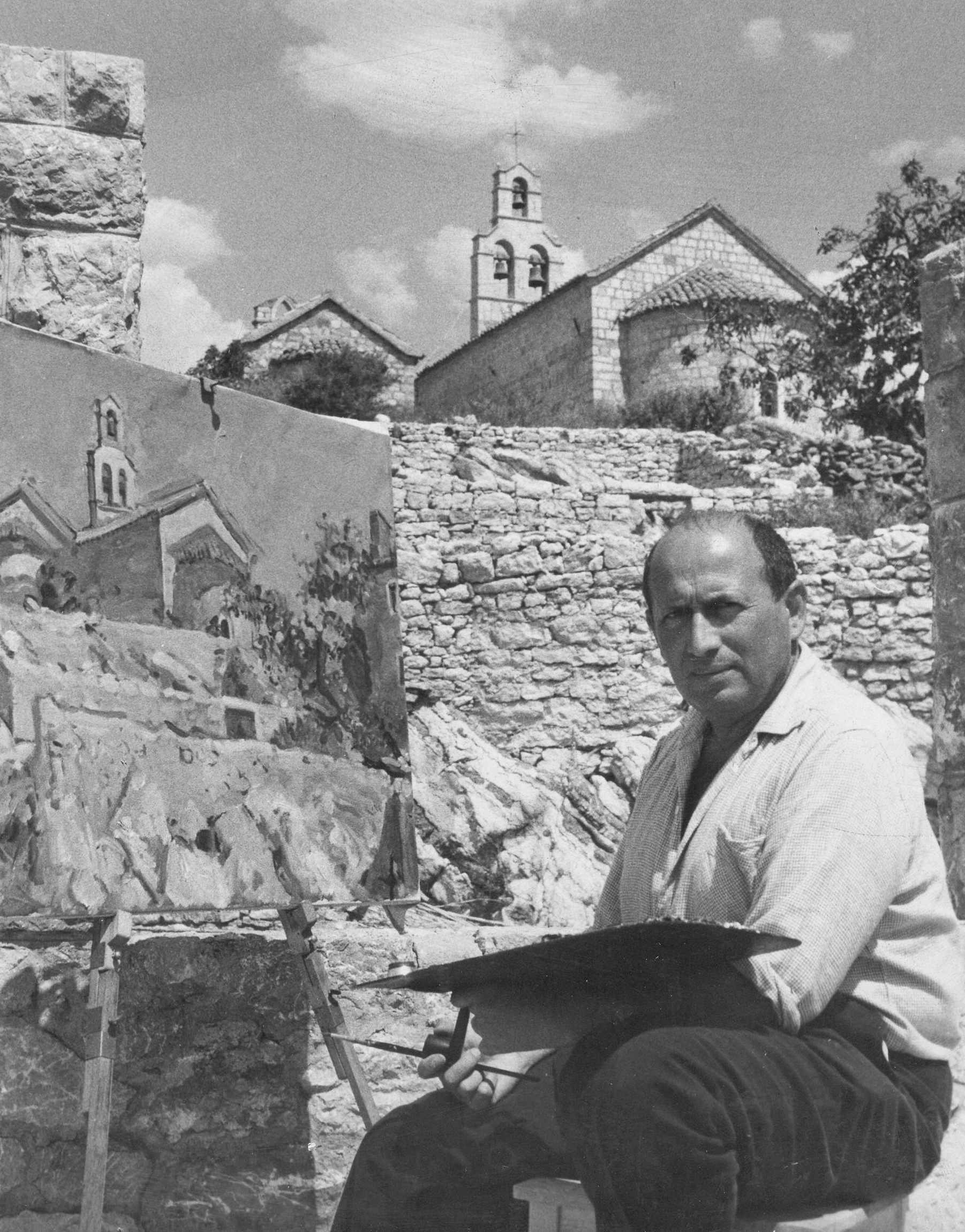 Marko Čelebonović